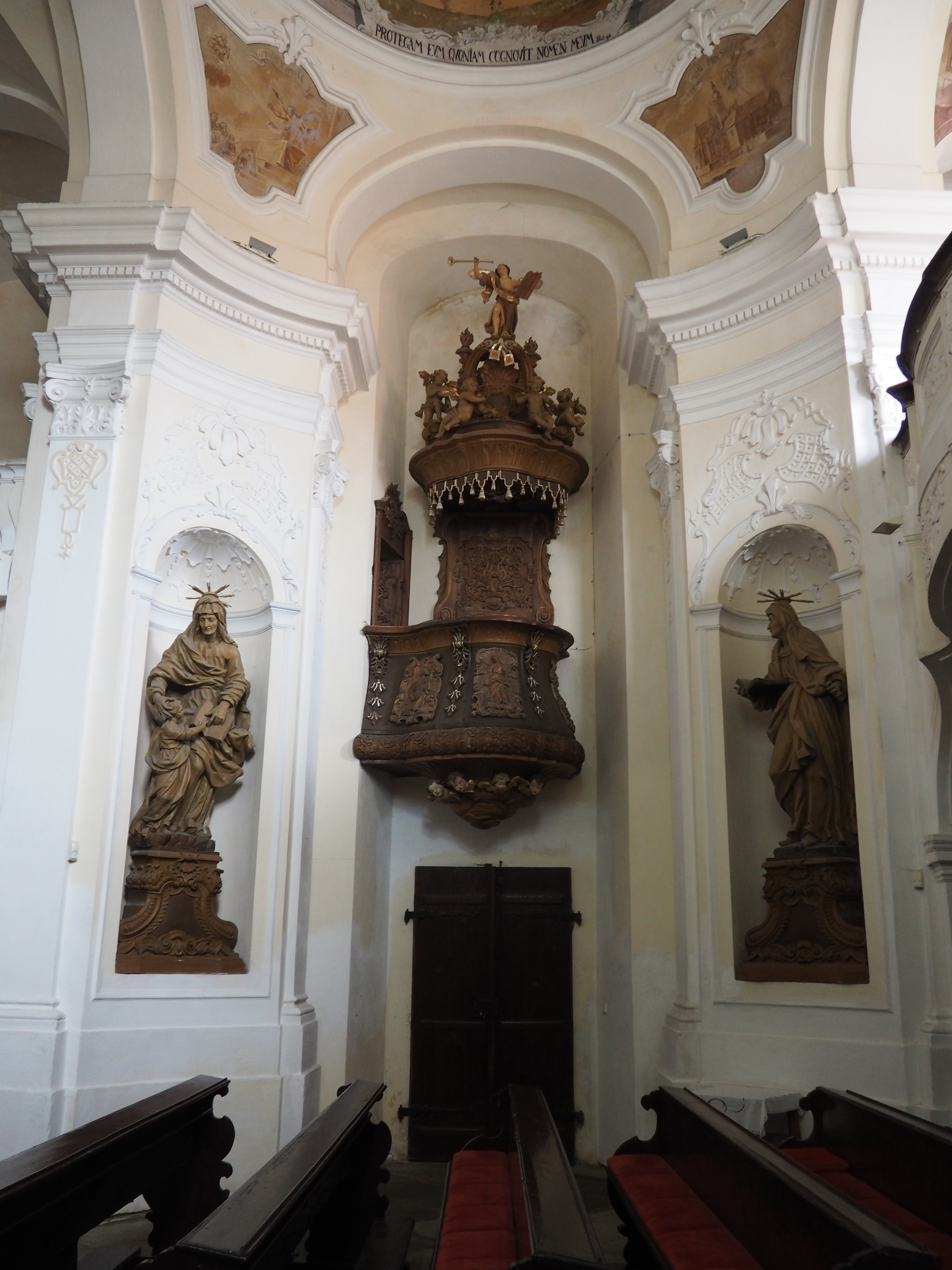 Kazatelna ve Škapulířové kapli